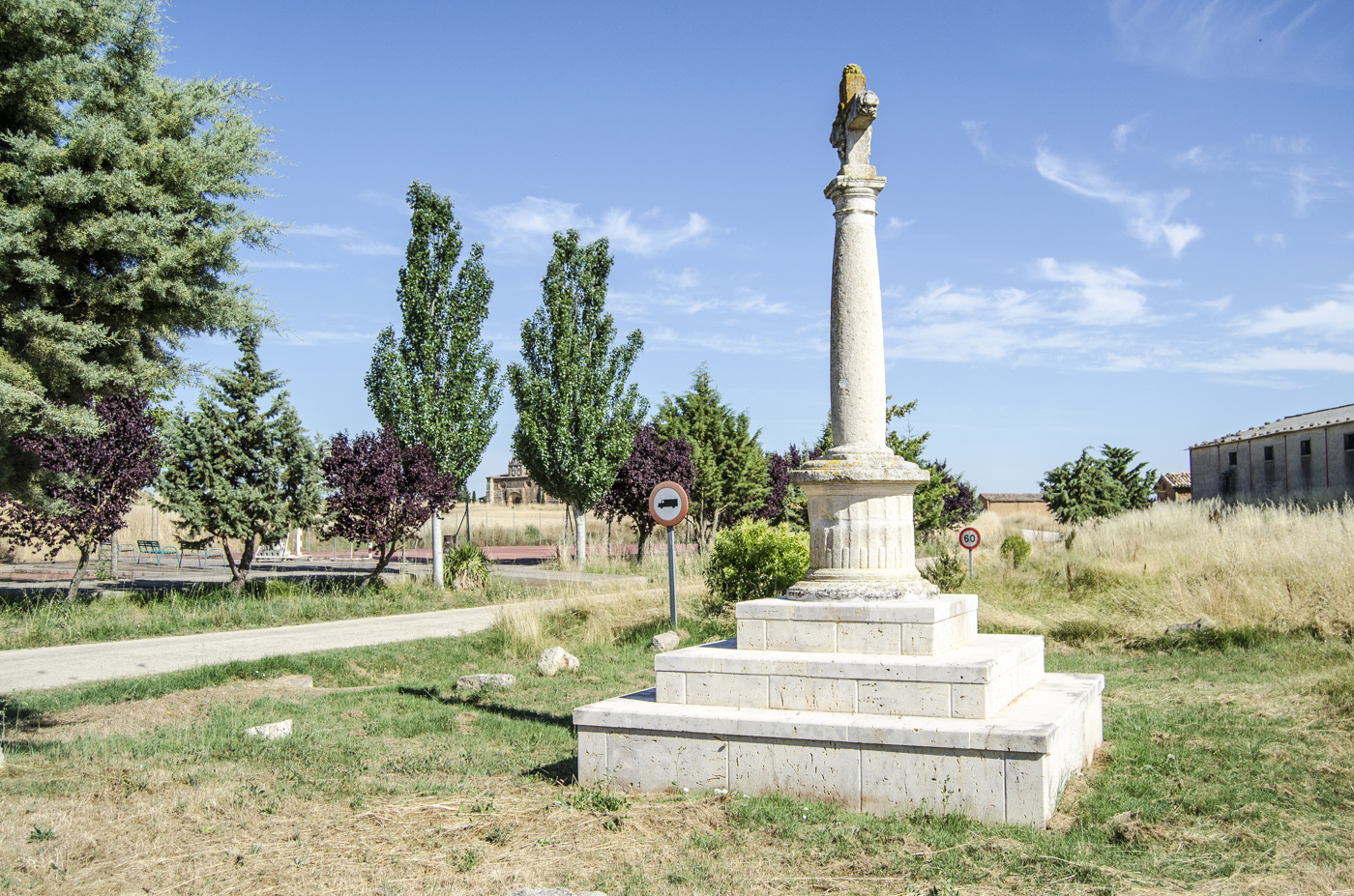 Uno de los dos cruceros de Padilla de Abajo. Este es el que se ubica a la salida del pueblo en dirección hacia Padilla de Arriba. Año 2016.